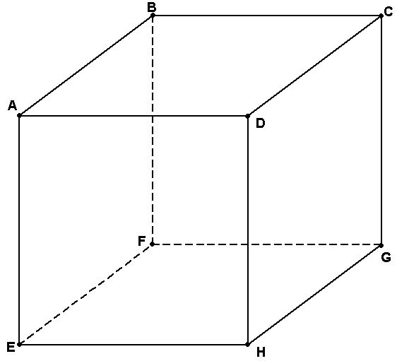 uitleg bij snijden/kruisen/evenwijdig zijn kubus overgenomen van "Svdmolen", als bijdrage voor kubus aanpassingen zelf uitgevoerd.